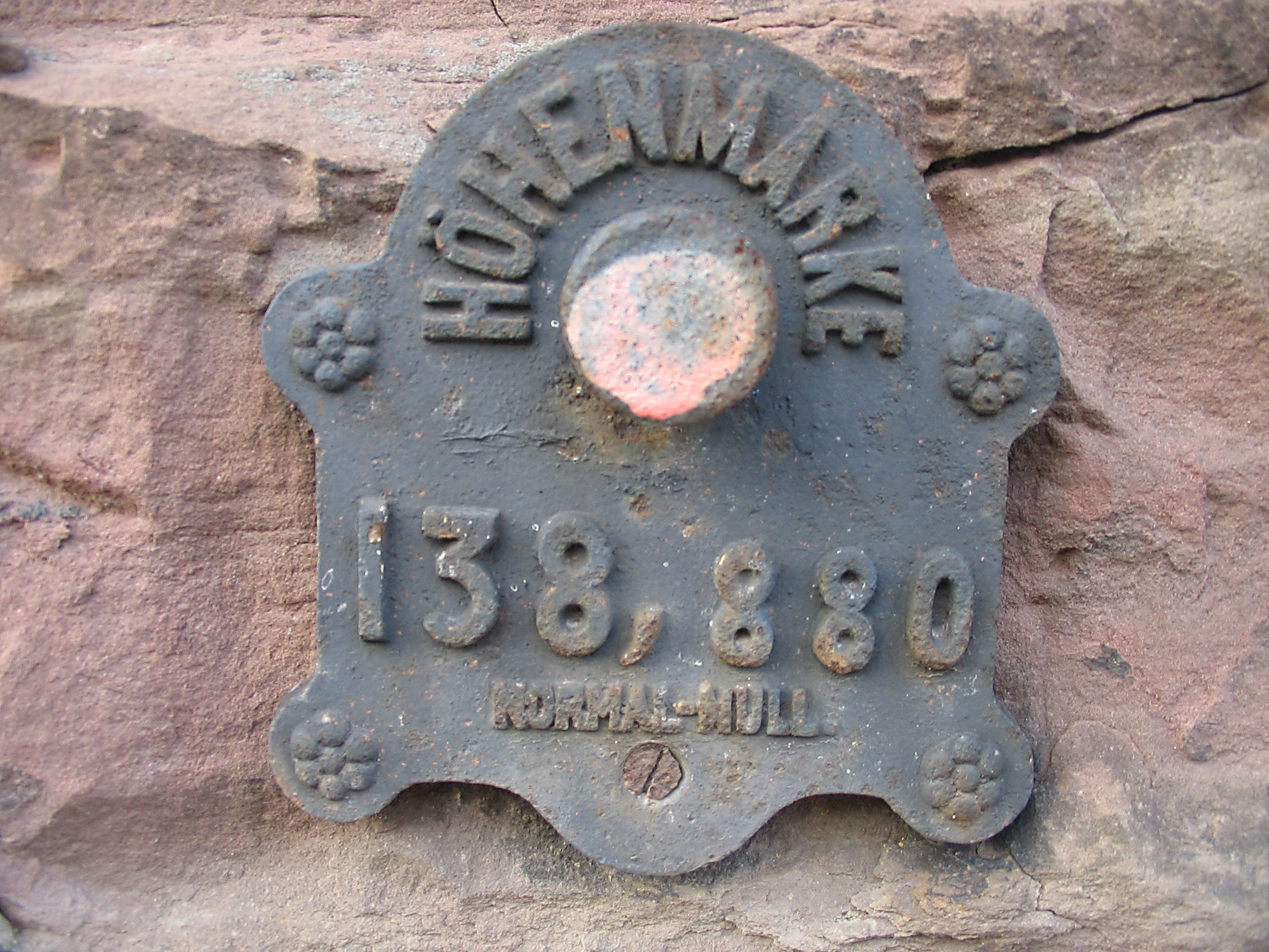 Borne de nivellement allemande sur la Kriegstor (fortifications militaires) dans le quartier de Cronenbourg (rue du Rempart) à Strasbourg.